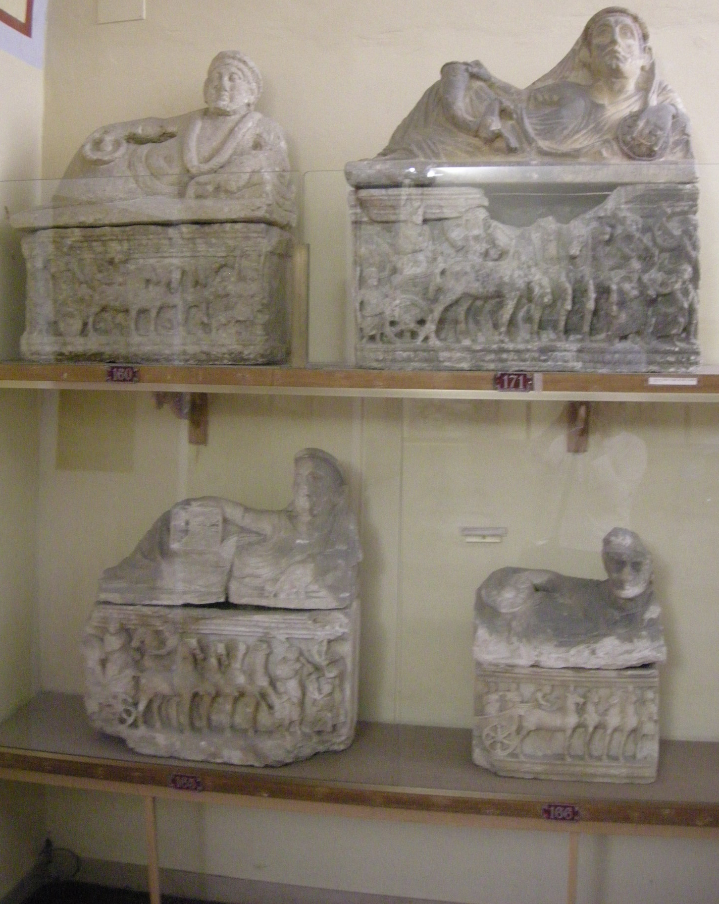 Museo guarnacci, sala delle urnette etrusche 2